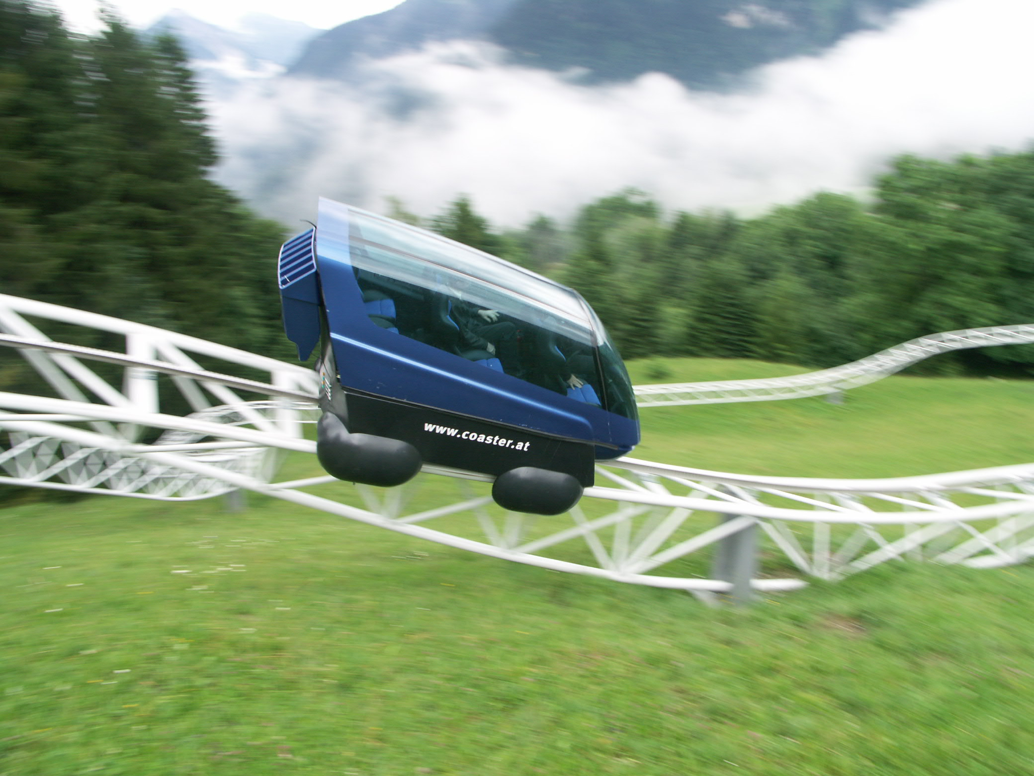 Alpencoaster